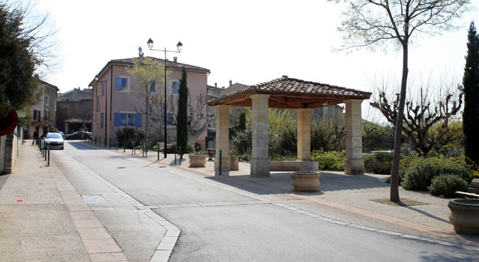 Malemort-du-Comtat in Vaucluse, France